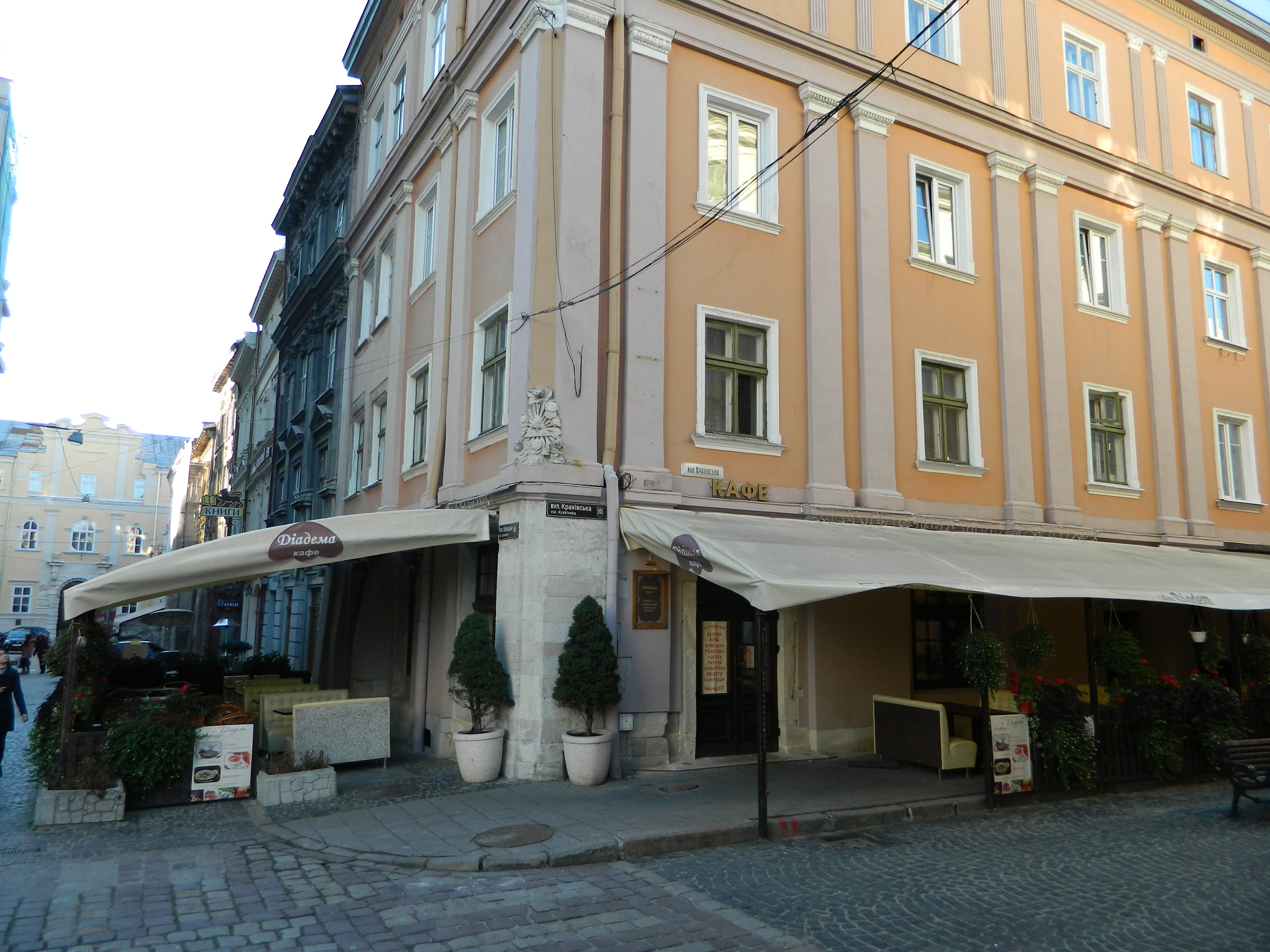 Дом Абреков. Львов